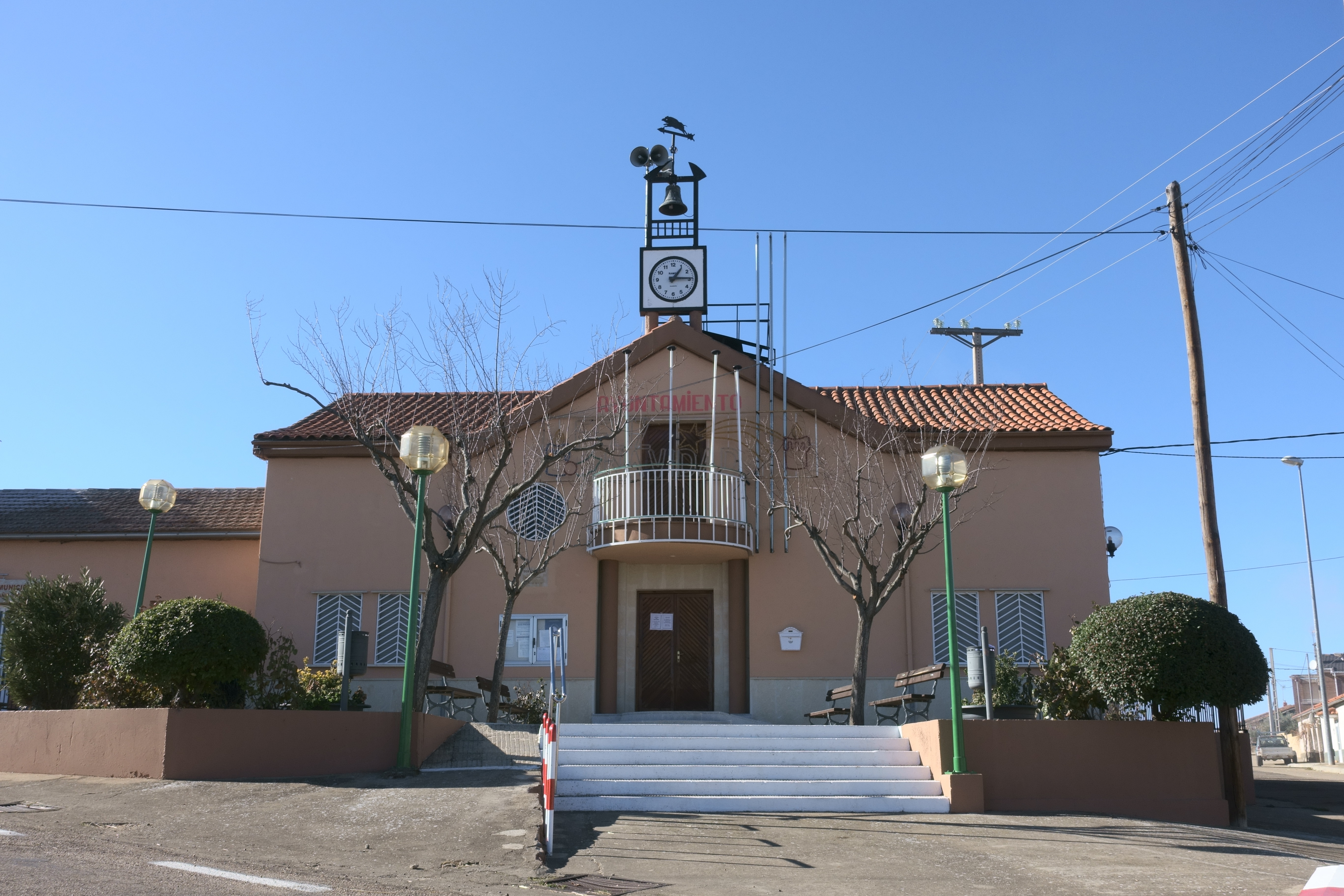 Casa consistorial de Dios le Guarde (Salamanca, España).